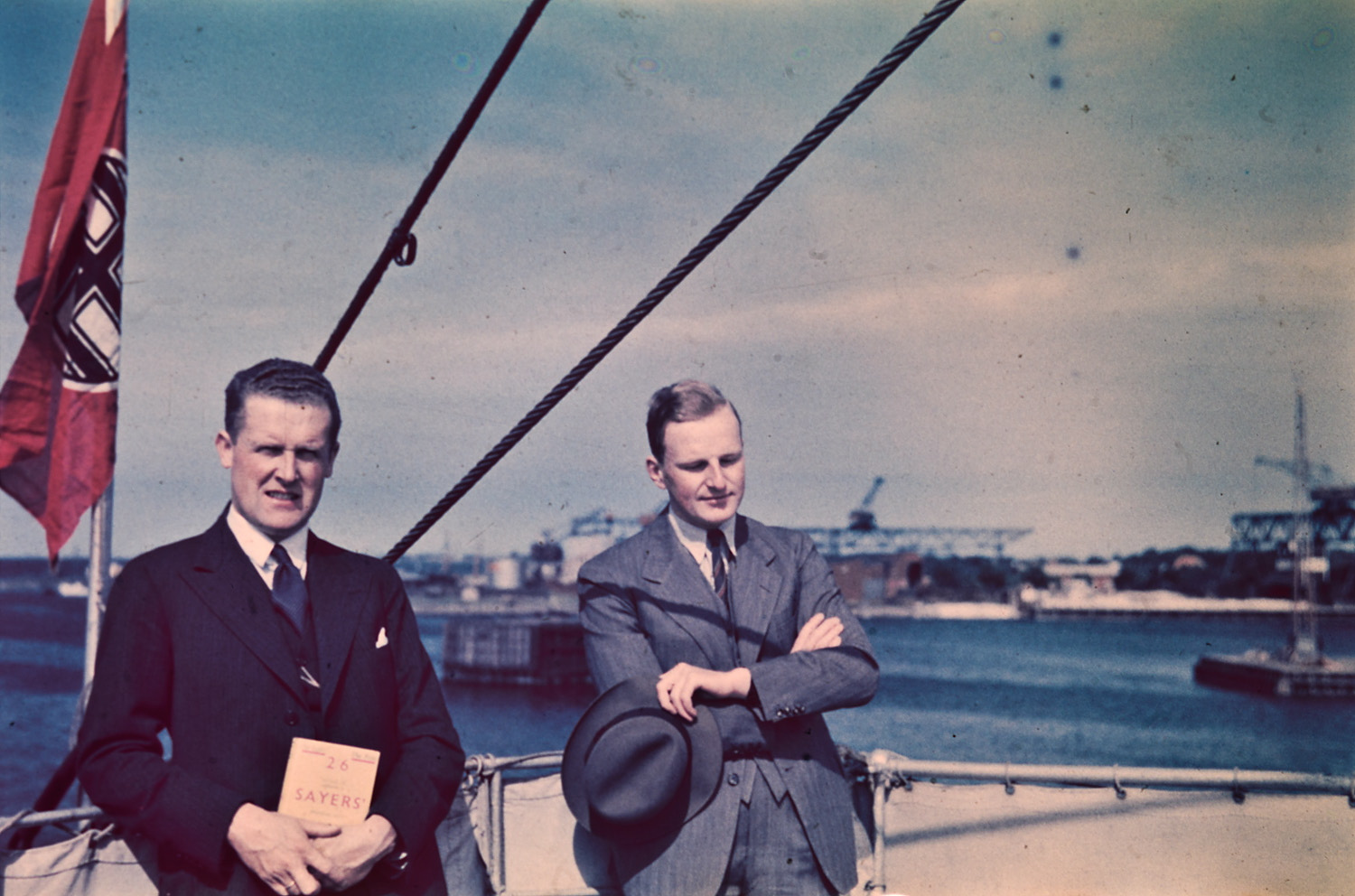 Bildet er hentet fra Arkivverket. Ombord på dampskipet Preussen. Johan B. Hjort til venstre. Fotograf: Thomas Neumann År: 1937 Kamera: Leica Film: Agfa color neu Arkivreferanse: PA1456Ub1_1_3_28 Arkivinstitusjon : Riksarkivet Arkivnavn : Neumann, Thomas Sted : Ukjent, Berlin, Berlin, Emneord: Sjø Avbildet